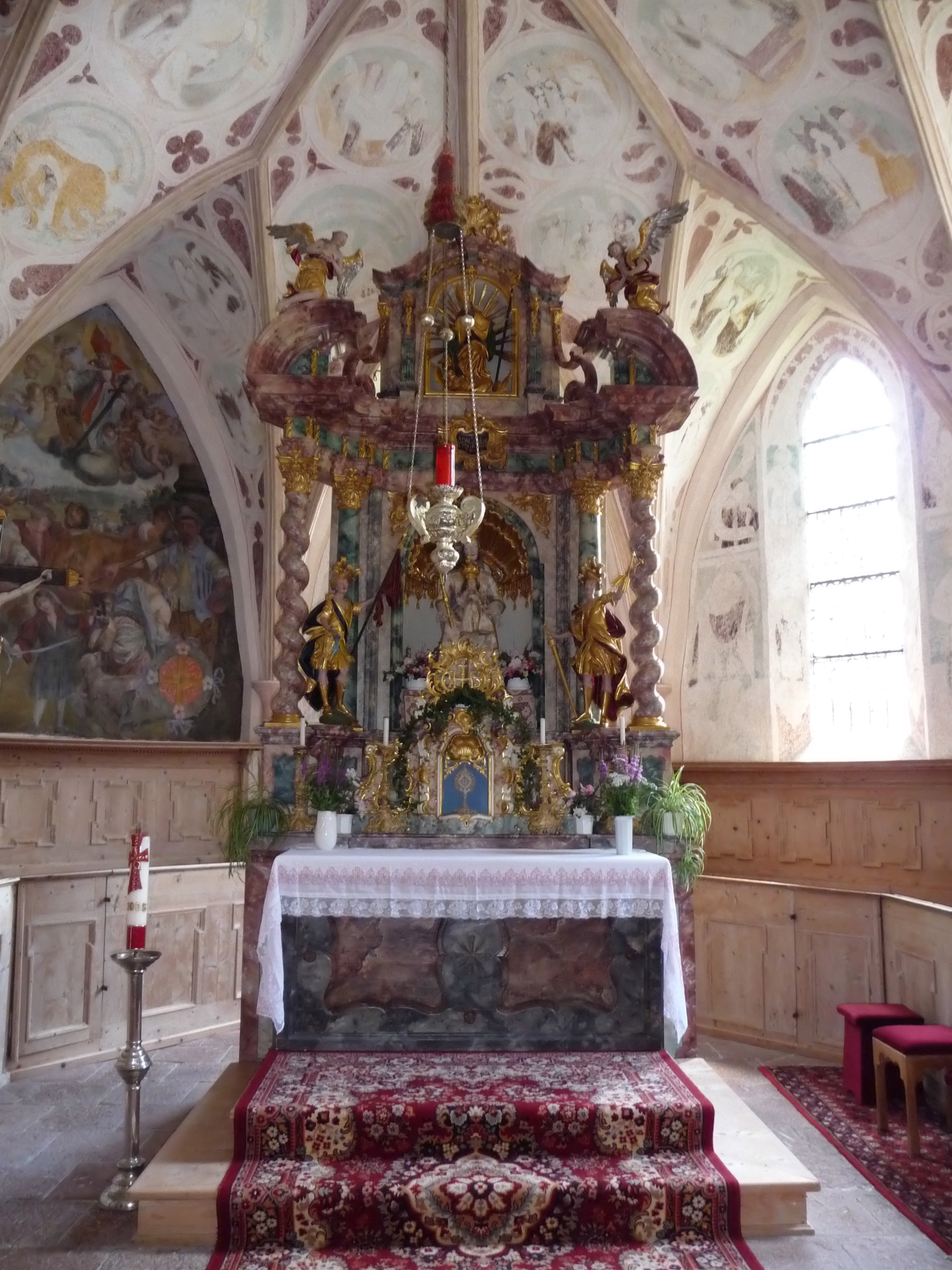 St. Adolari-Kapelle